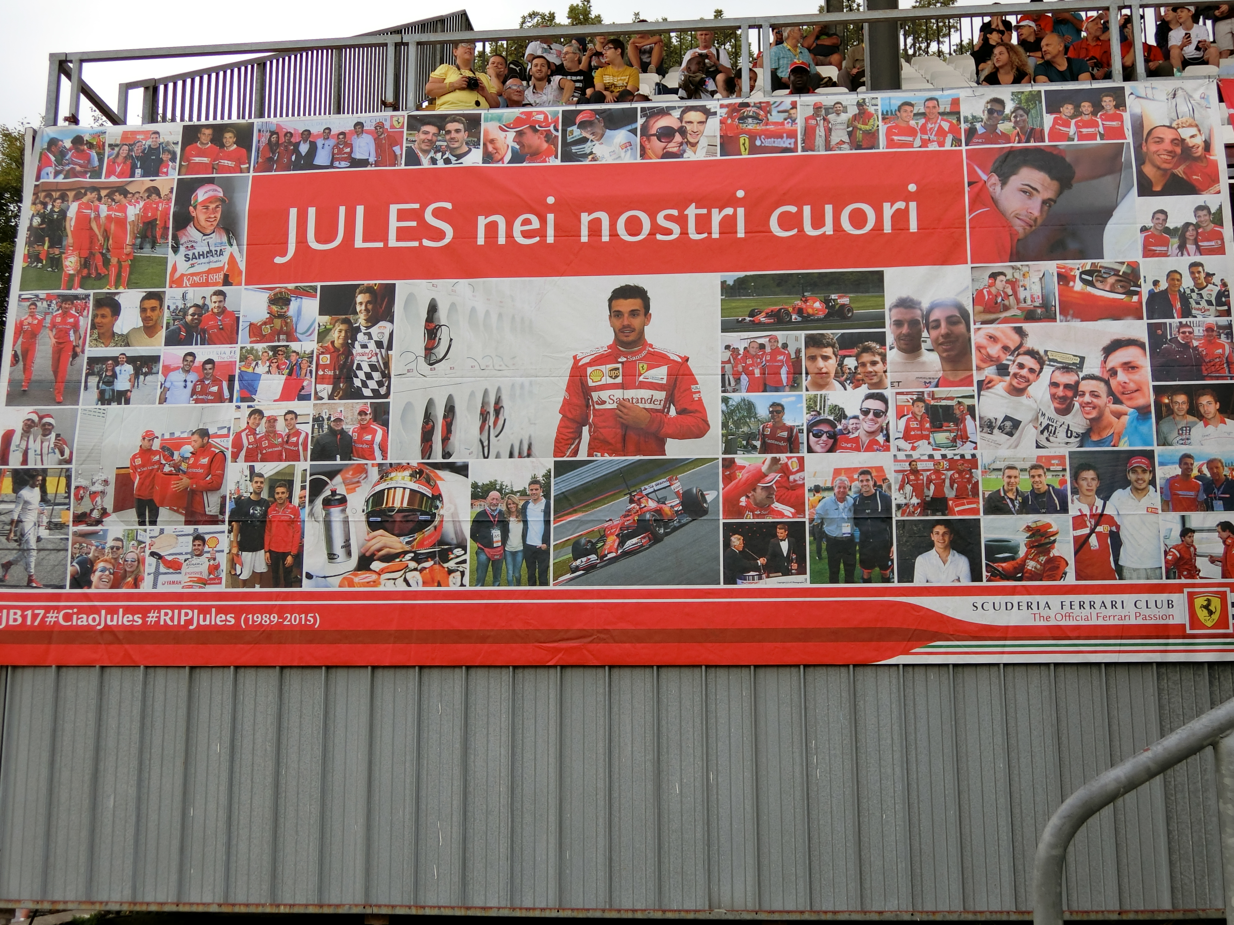 グラスタのジュールバナー